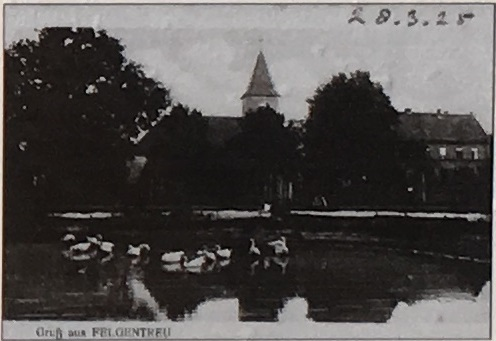 Historische Aufnahme der Kirche auf einer öffentlich zugänglichen Infotafel in Felgentreu, Nuthe-Urstromtal in Brandenburg